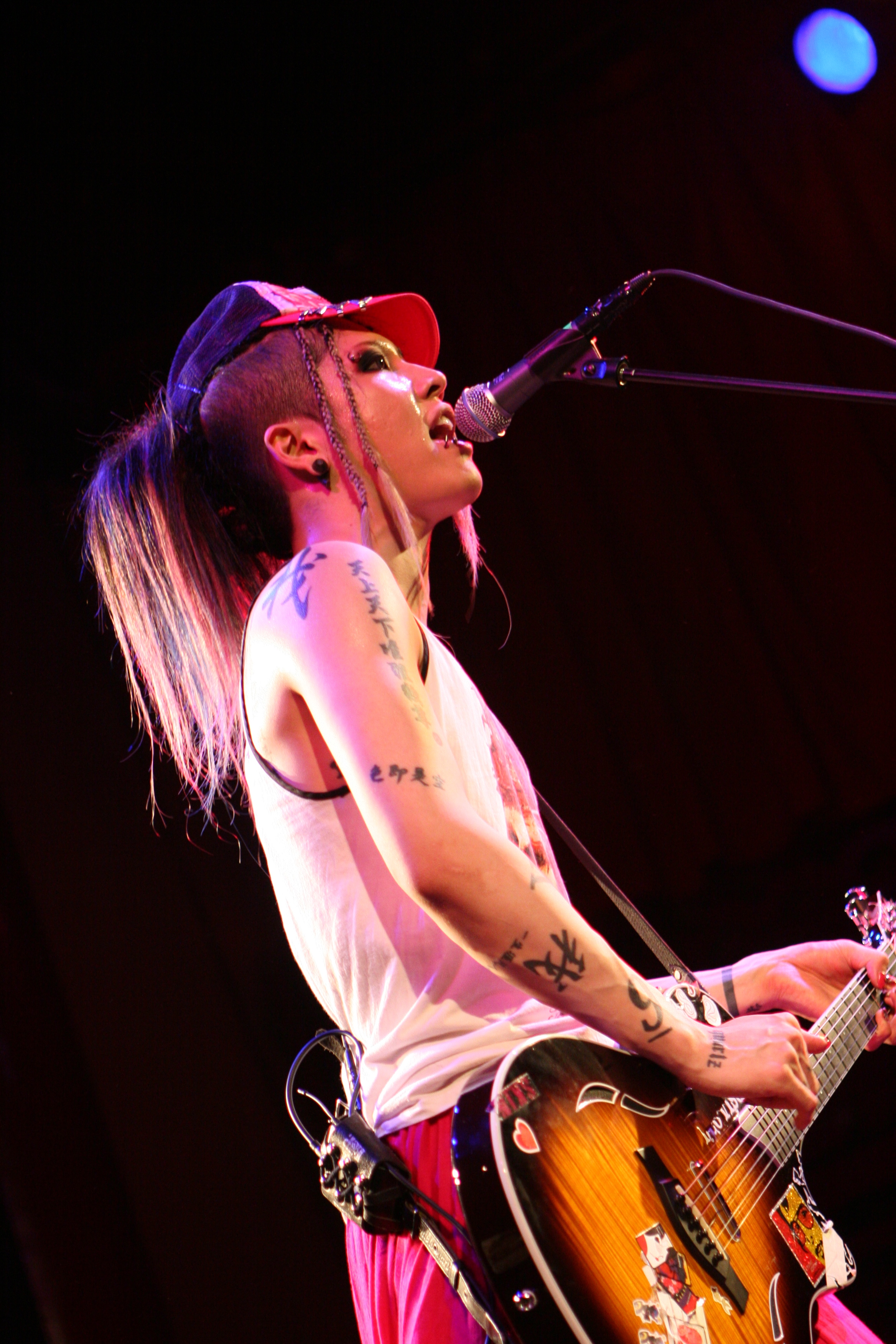 Miyavi en la la sala Apolo de Barcelona el 27 de Junio de 2008.